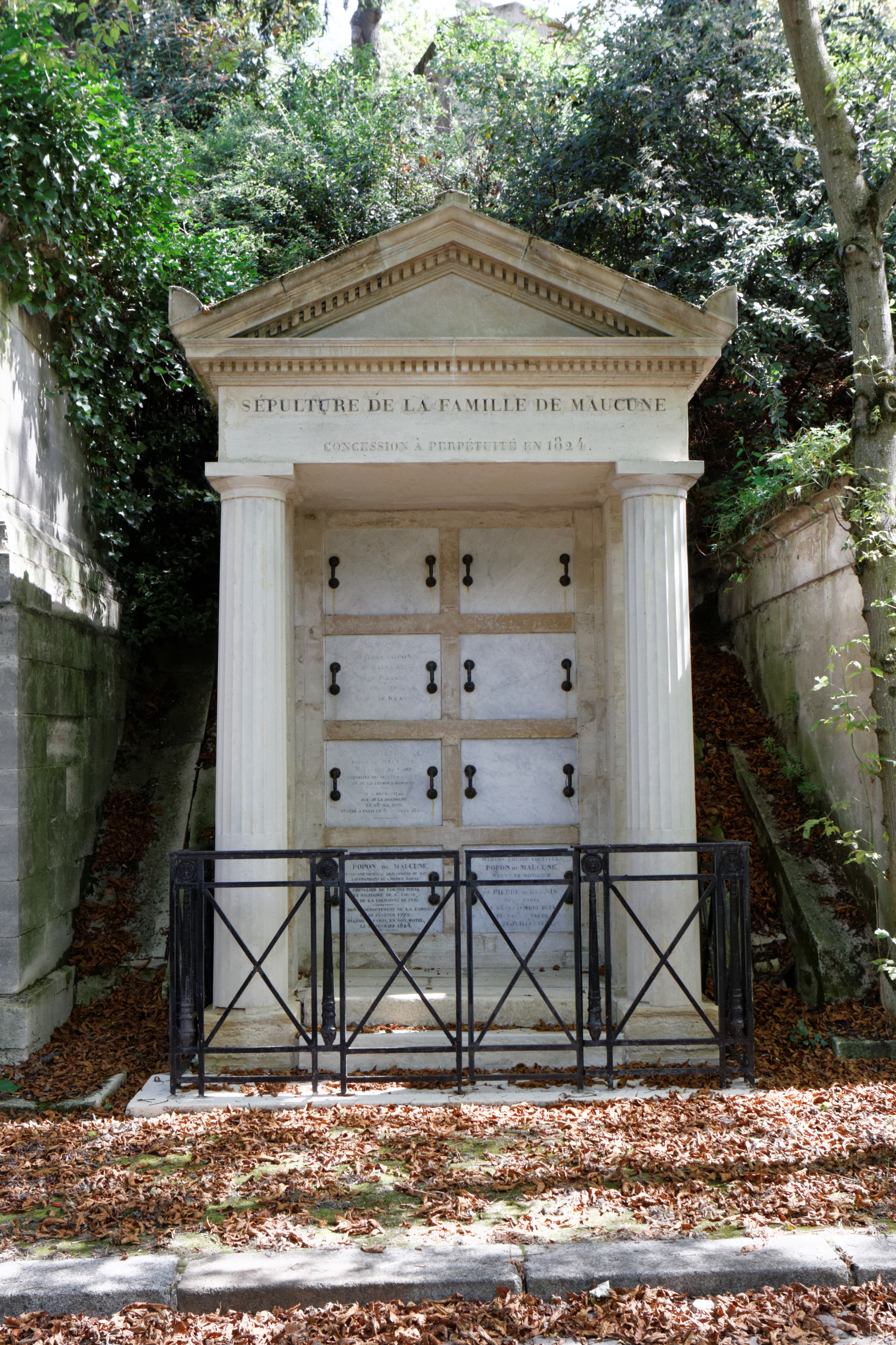 Sépulture du général de division Antoine Louis Popon (1772-1824) et du maréchal de camp Louis Popon (1775-1845).